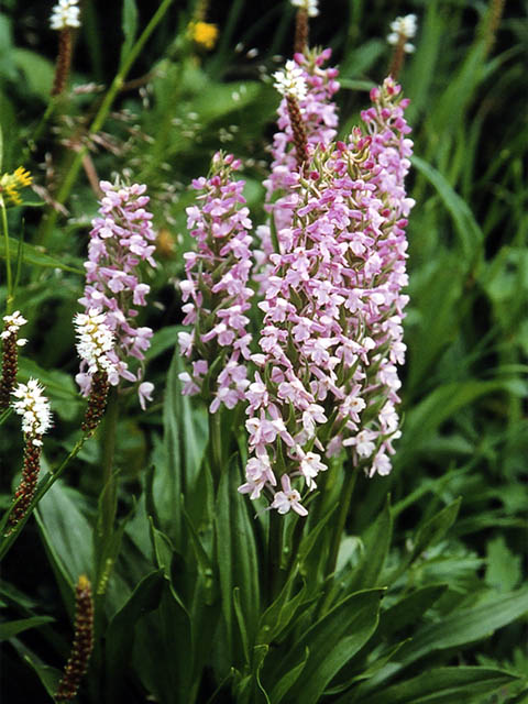 Gymnadenia conopsea en Tita-dake, Sierra Akaishi Japon. テガタチドリ、南アルプス・北岳で撮影